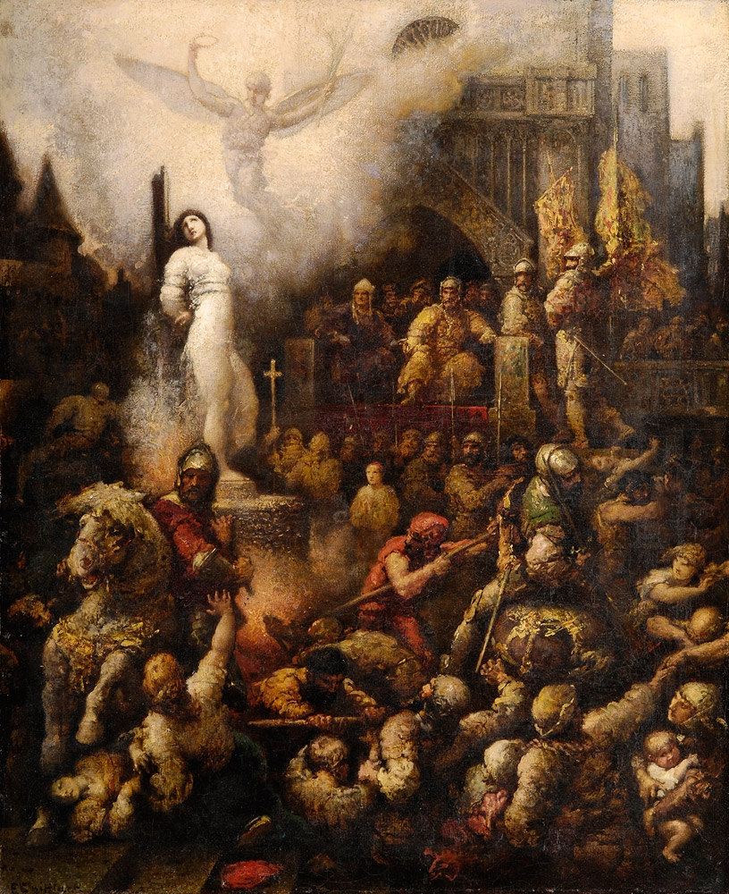 Jeanne d'Arc. Signiert. Öl auf Leinwand, 73 x 60 cm